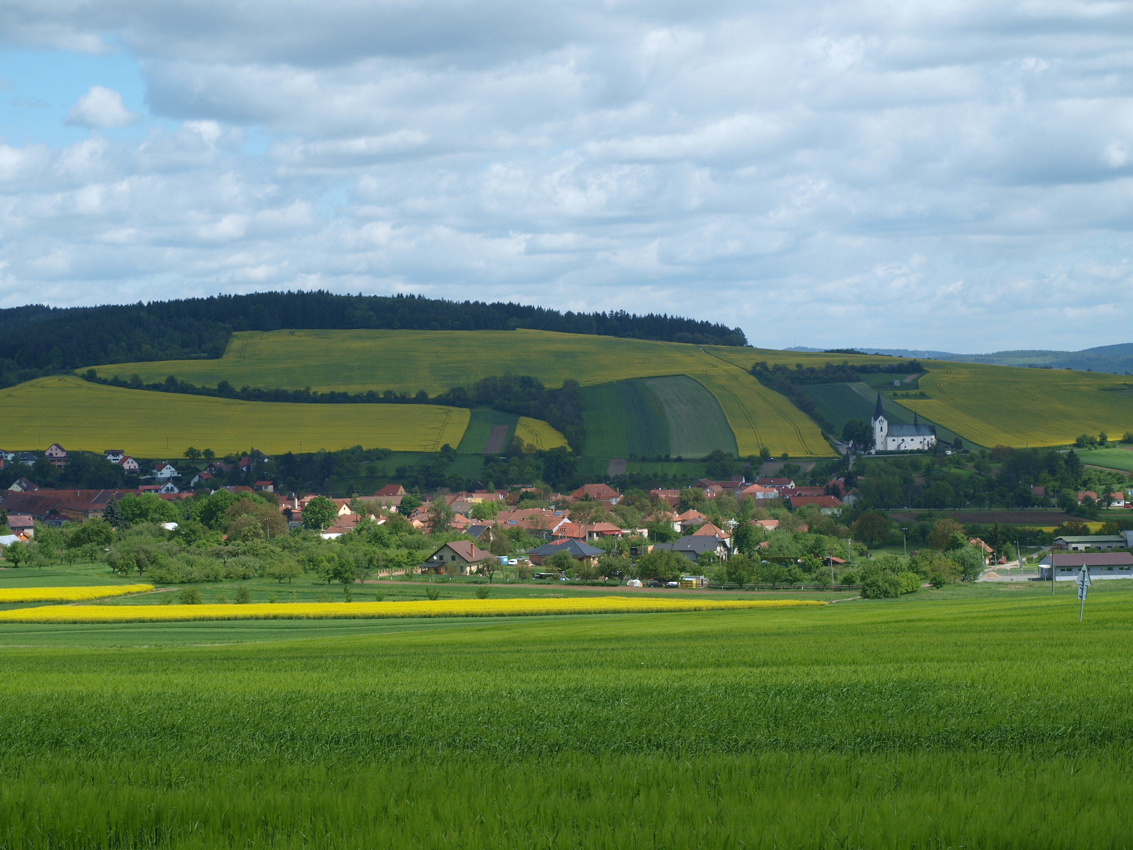 Pohled na Drnovice od Lysic